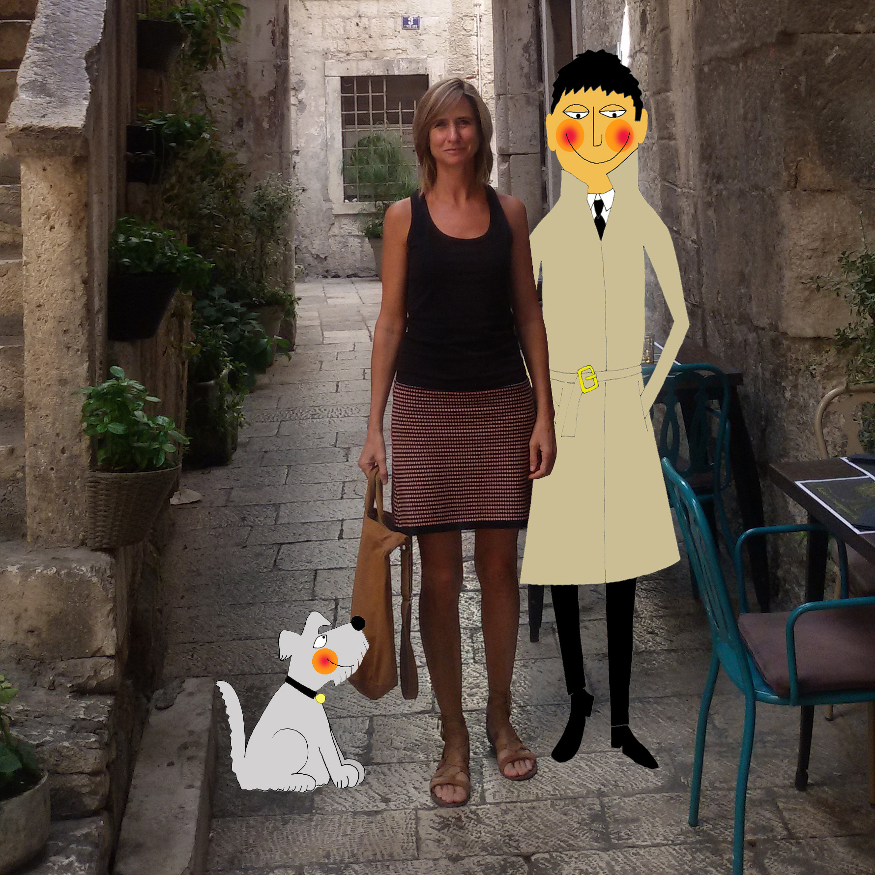 Amaia Cía Abascal, escritora (y, a veces, dibujante)